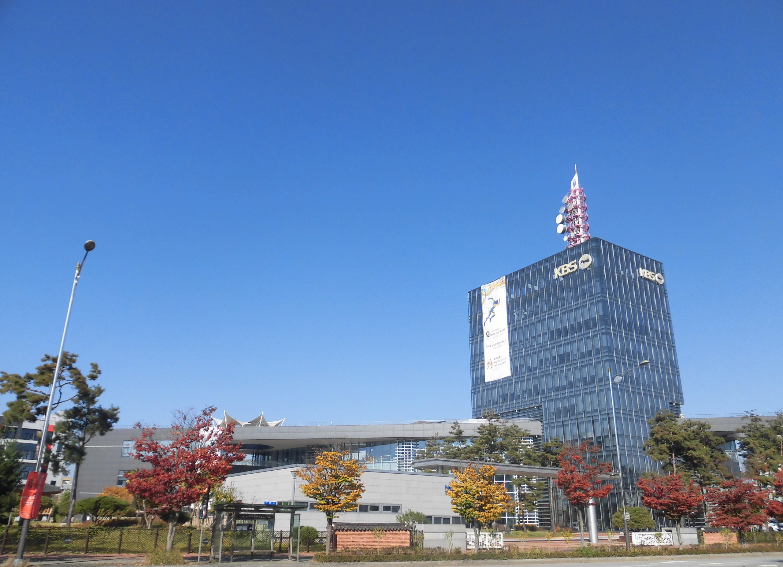 전라북도 전주시에 있는 한국방송공사 전주방송총국